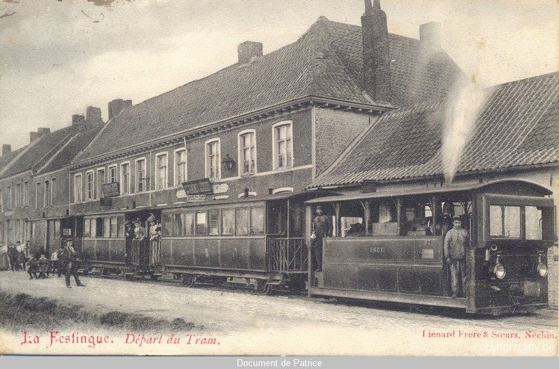 Carte postale Titre : La Festingue. Départ du Tram. Description : Locomotive de type 3 et remorques voyageurs au terminus de Néchin La Festingue. voir Lemaire et Simonet Le rail en Tournaisis pages 158 pour le type de locomotive.